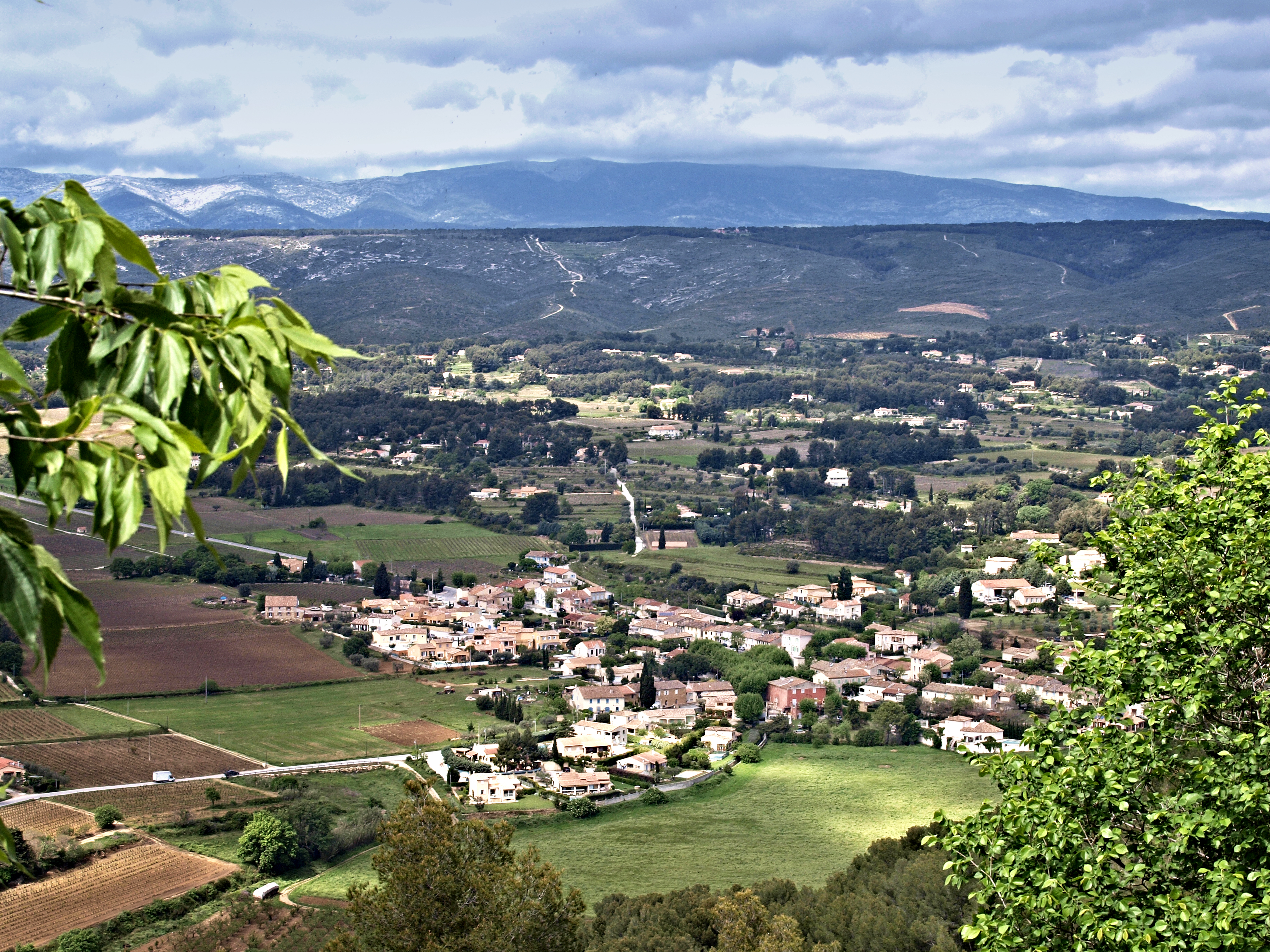 Le Castellet (Var - France) - Le Brulat